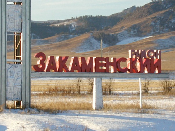 При въезде в Закаменский район